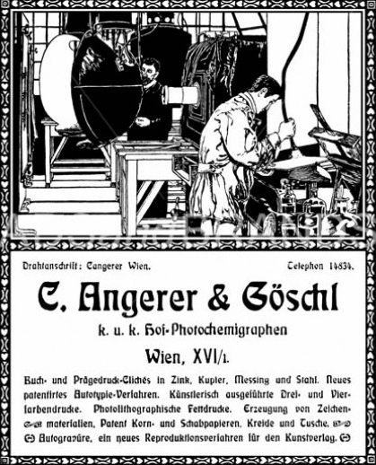 C. Angerer & Göschl · K. u. k. Hof-Photochemigraphen · Wien, XVI/1., Ottakringerstraße 49 · Buch- und Prägedruck-Clichés in Zink, Kupfer, Messing und Stahl. Neues patentiertes Autotypie-Verfahren. Künstlerisch ausgeführte Drei- und Vierfarbendrucke.